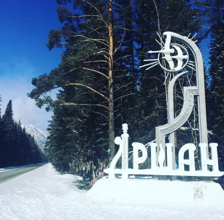 At the entrance to the village of Arshan